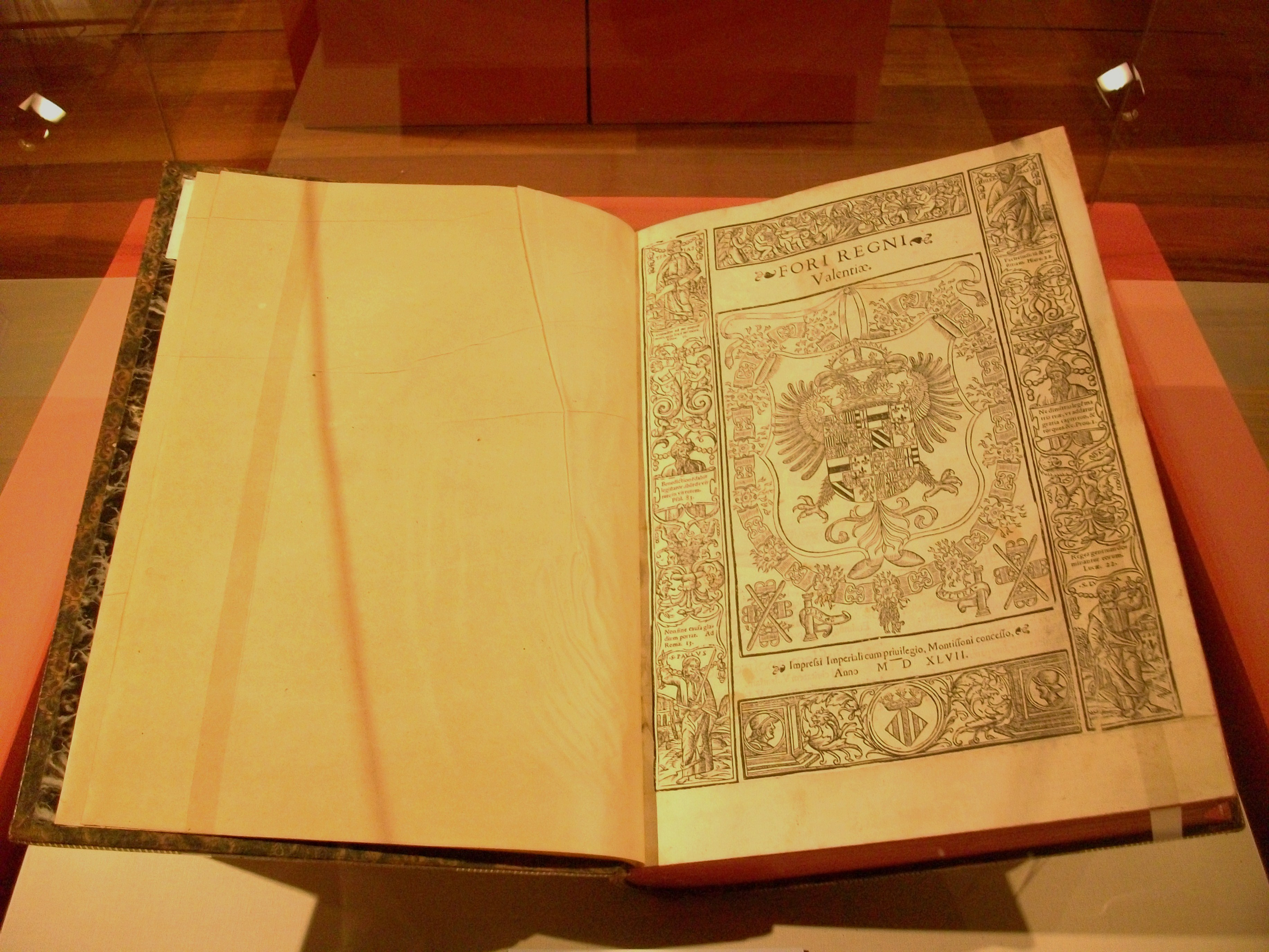 Edició dels Furs de València (FORI REGNI Valentiae) de Joan Mey, 1547. Biblioteca Valenciana.